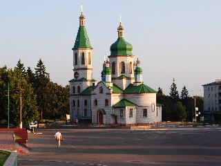 Тетіївська церква